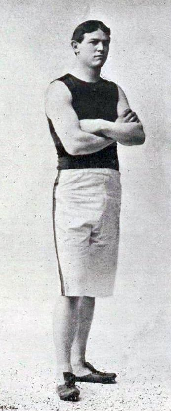 Josiah McCracken, vice-champion olympique du lancement du poids en 1900.